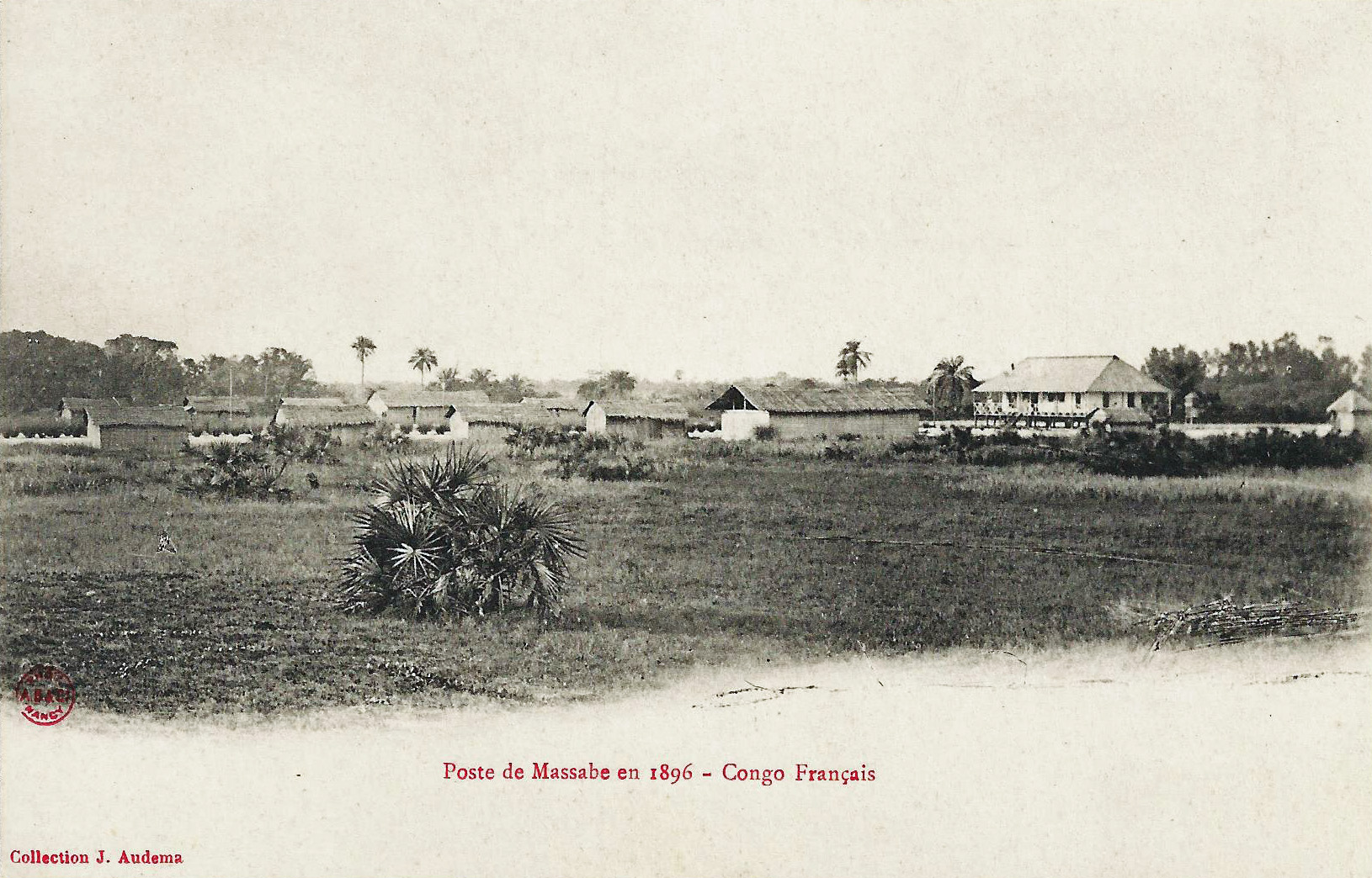 Poste de Massabe en 1896. Collection J. Audema. Phot. A.B. & Cie, Nancy [Albert Bergeret] Congo Français